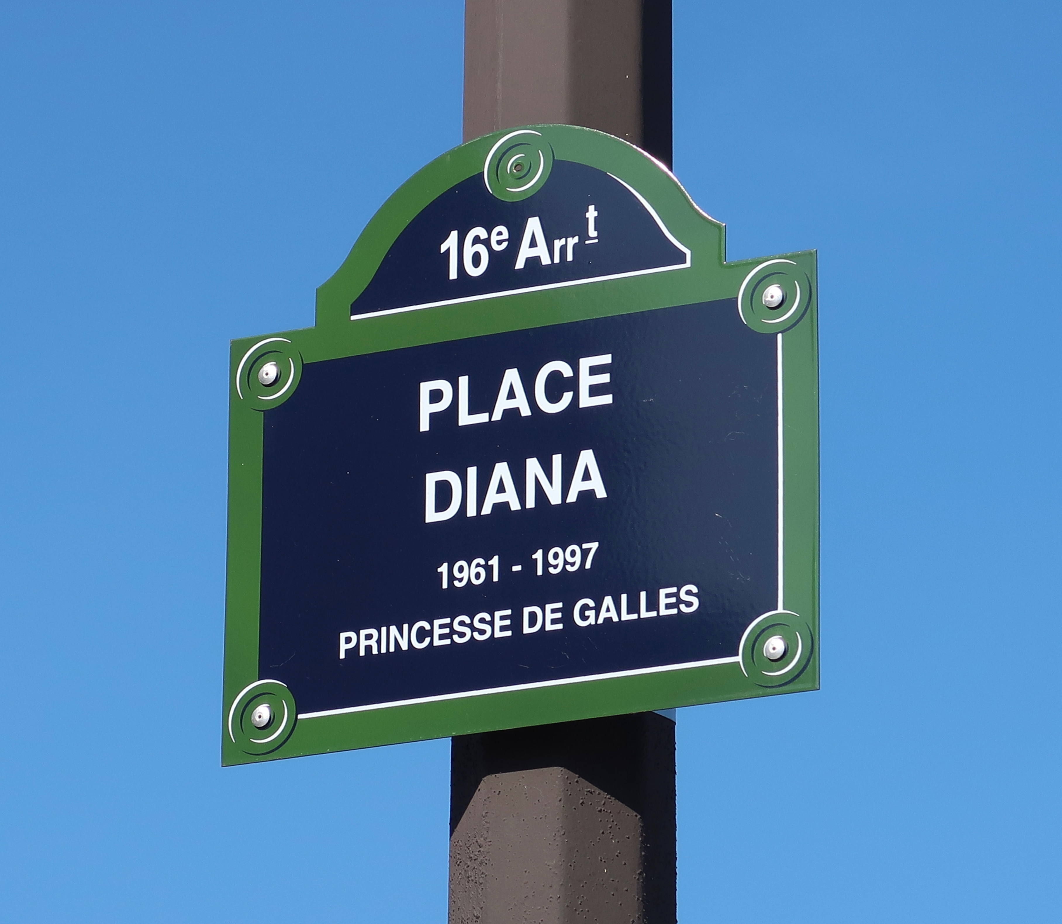 Plaque de la place Diana (Paris, 16e).